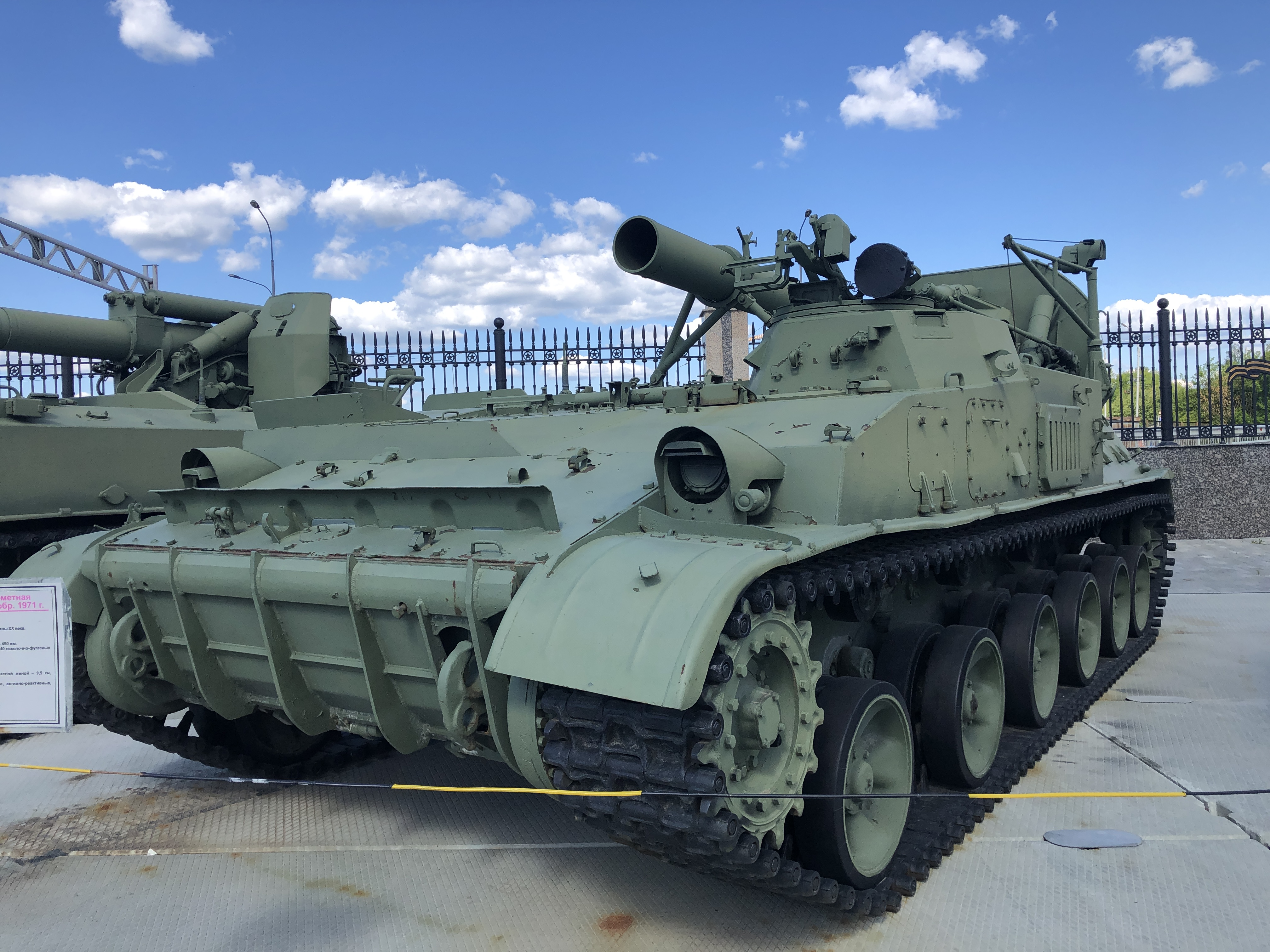 2C4 "Тюльпан" в Музейном комплексе УГМК, г. Верхняя Пышма, Свердловская область